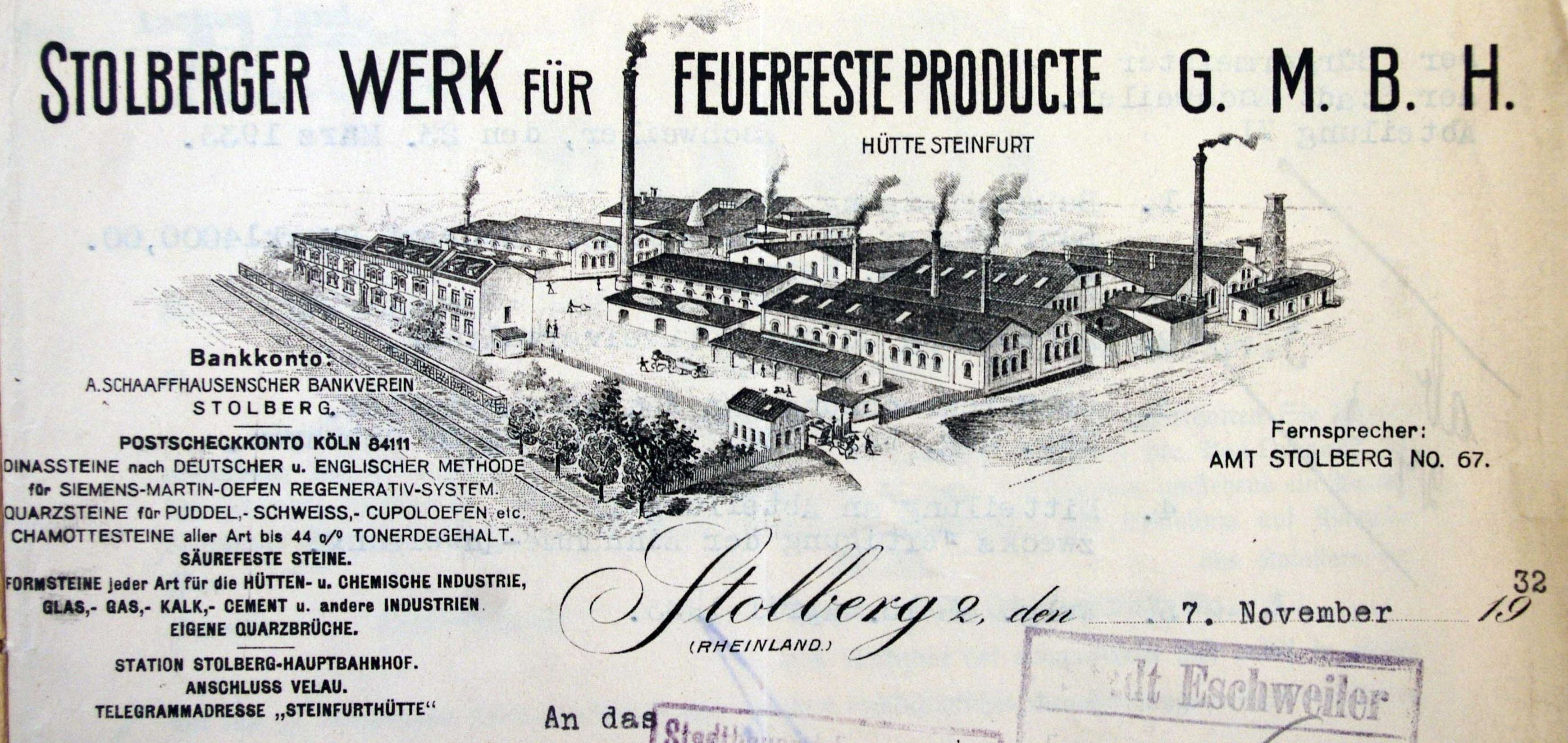 Briefkopf des Stolberger Werks für Feuerfeste Produkte - Hütte Steinfurt - mit idealisierter Gesamtansicht, um 1930